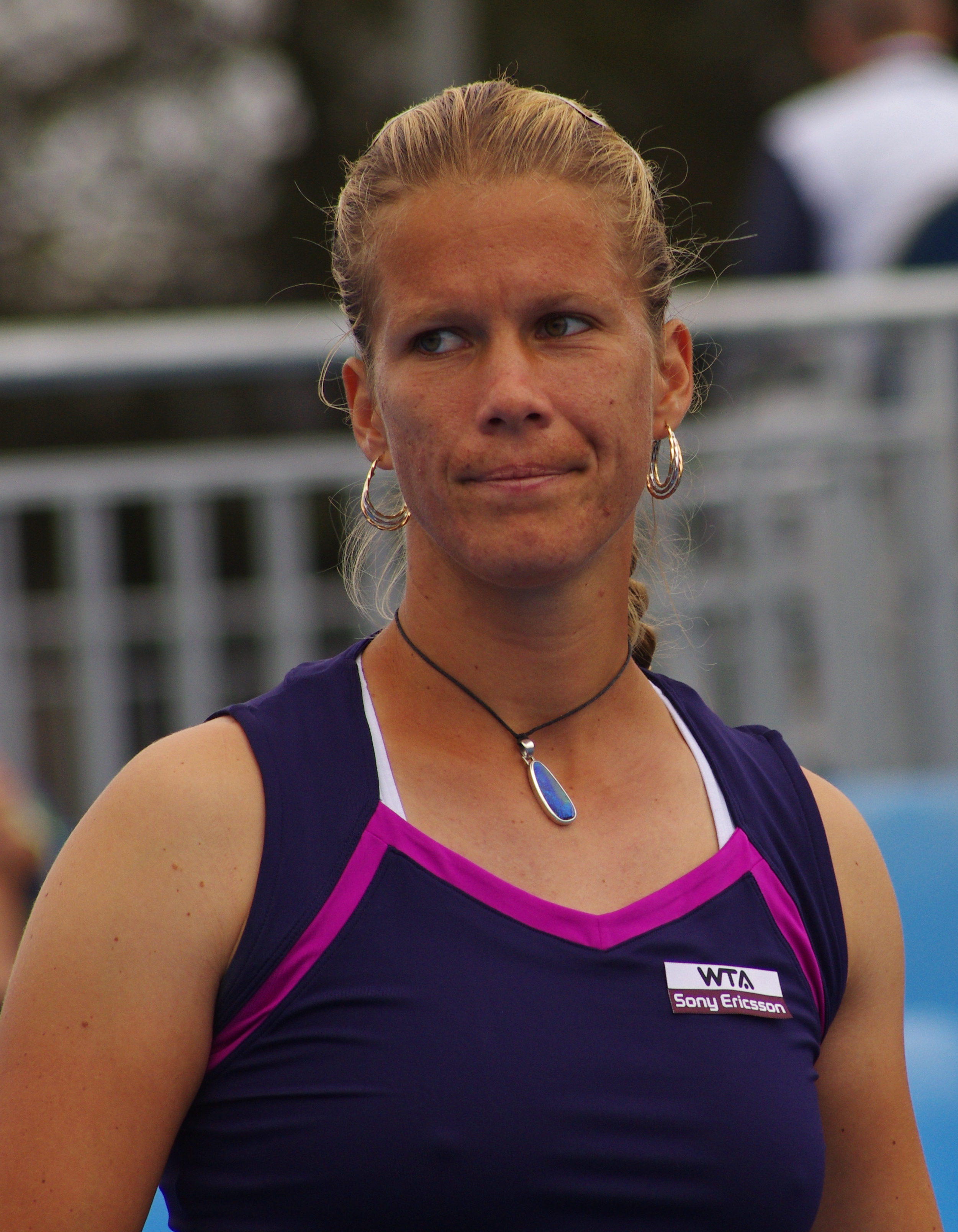 Melinda czink